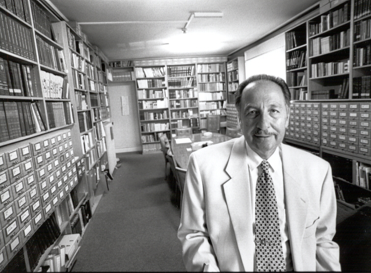 Péter Gosztonyi, auch Peter Gosztony (* 2. Dezember 1931 in Budapest; † 30. März 1999 in Bern), ungarisch-schweizerischer Militärhistoriker. Leiter der Schweizerischen Osteuropa Bibliothek in Bern